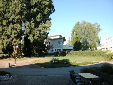 Centre de formation et de rencontre Bienenberg